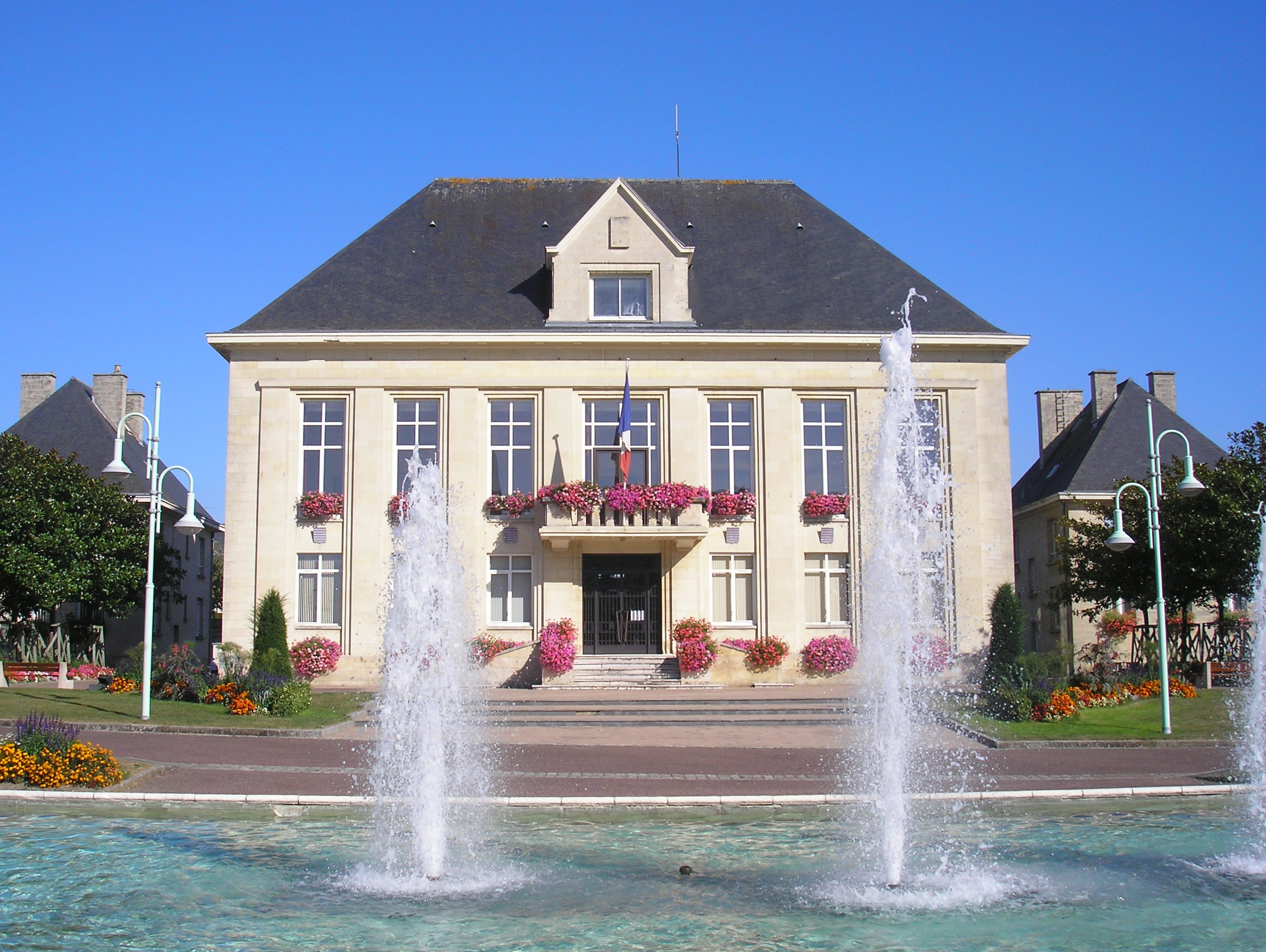 Aunay-sur-Odon (Normandie, France). L'hôtel de ville.